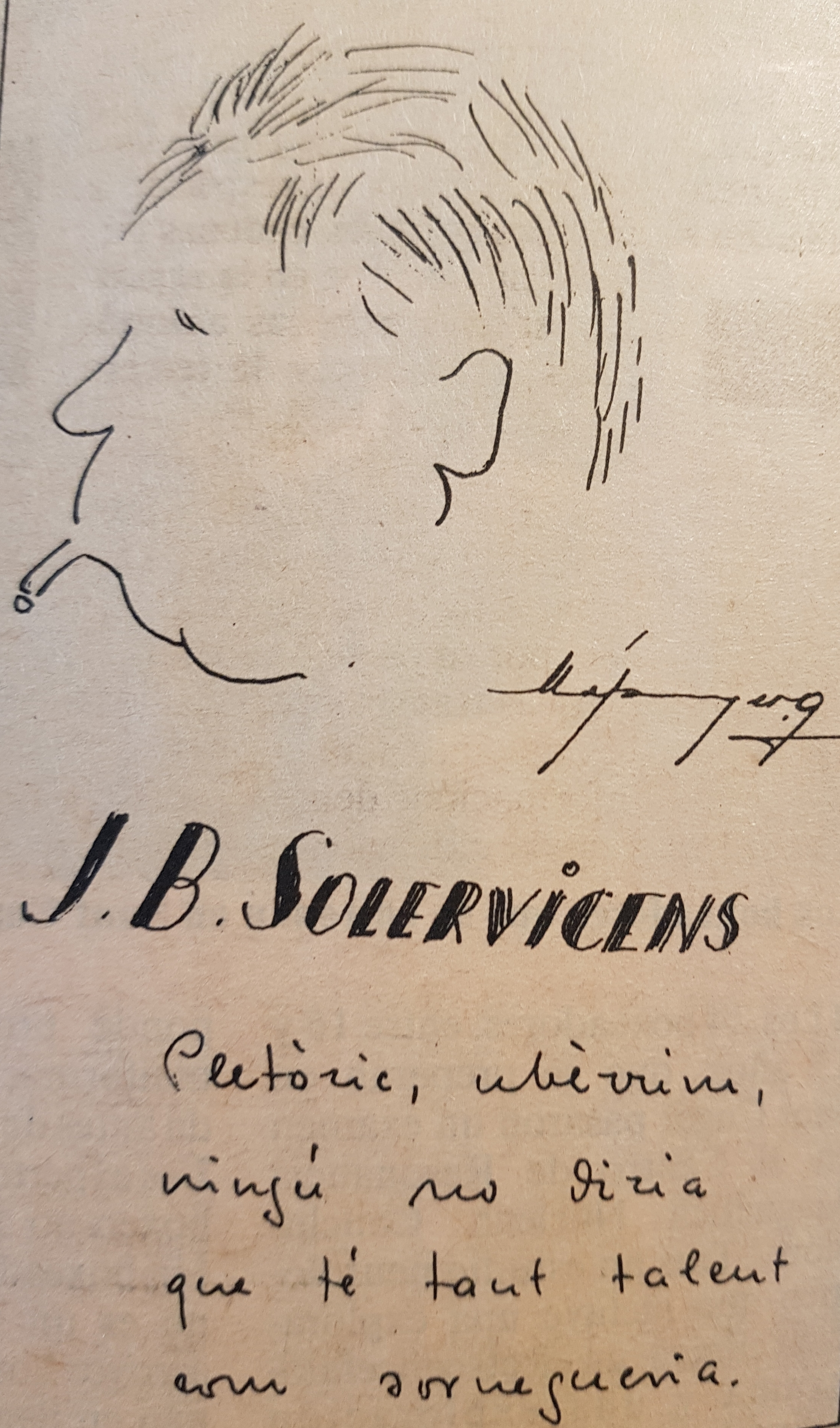 Poema i caricura de J.B.Solervicens per Gimeno-Navarro publicat per Lluís Permanyer a La Vanguardia de Barcelona.